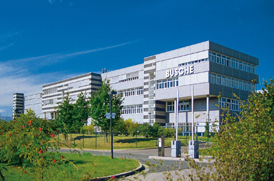 Busche Gebäude Schleefstraße